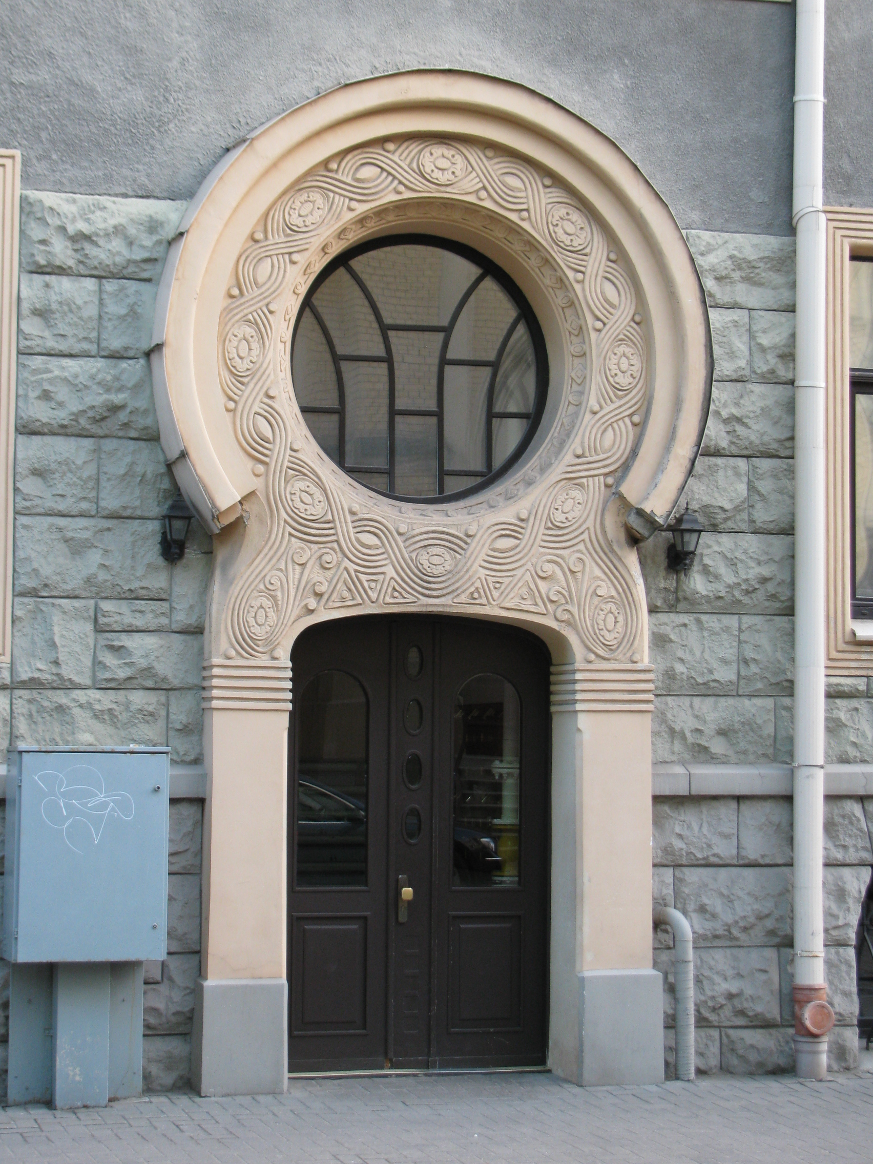 Īres nams, Rīga, Vīlandes iela 10